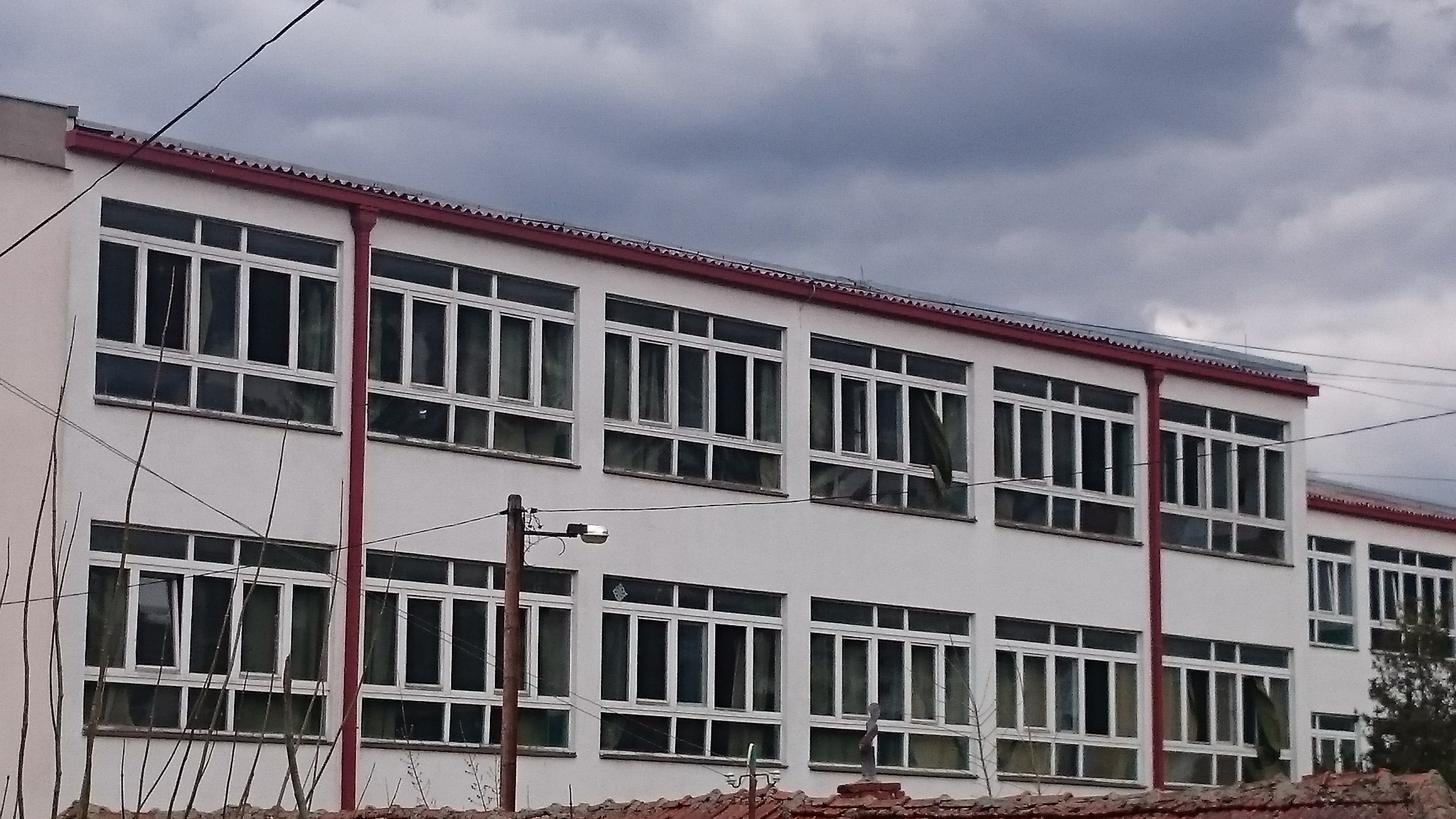 Osnovna skola "Predrag Devedzic", Vranjska Banja